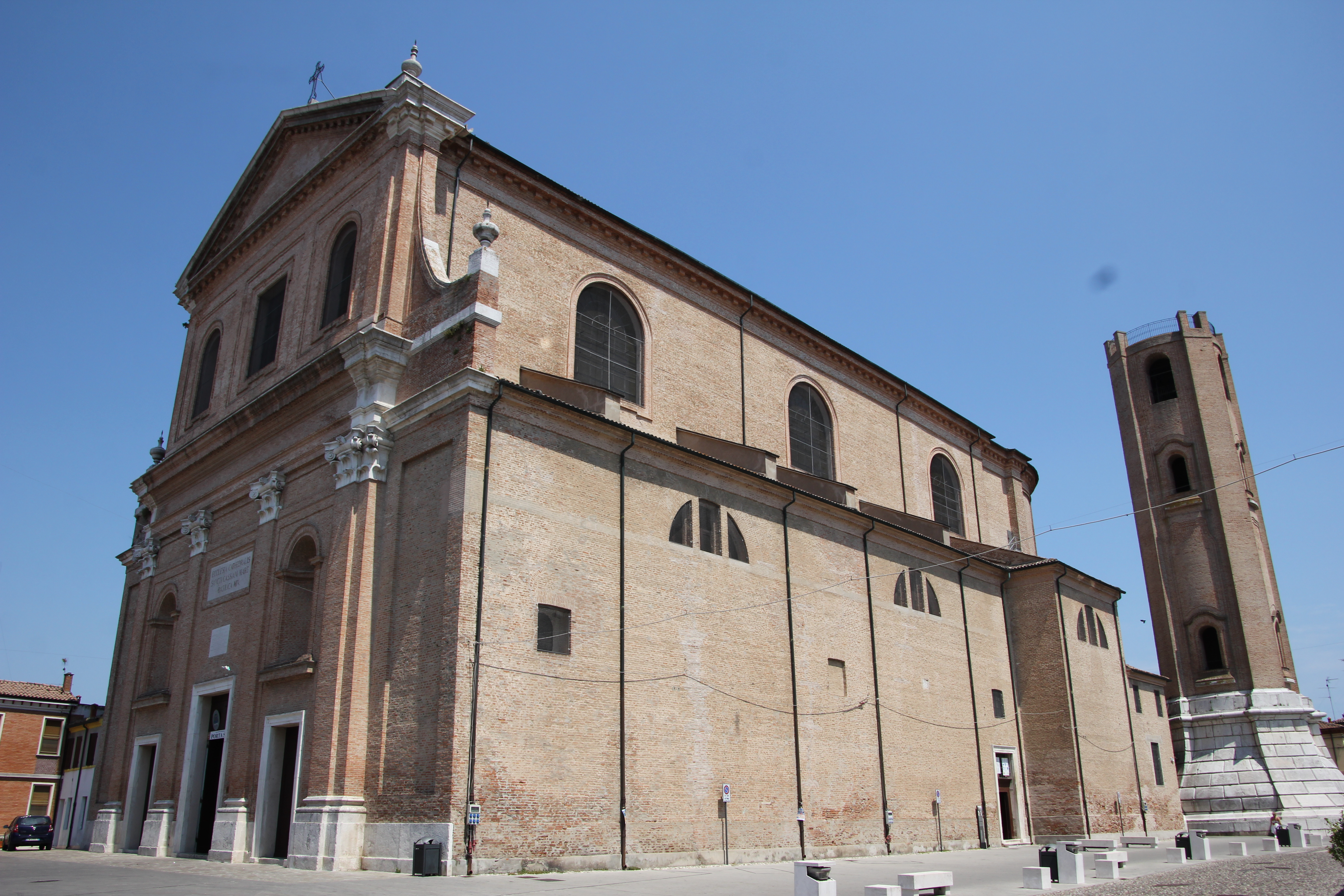 Comacchio, basilica di San Cassiano